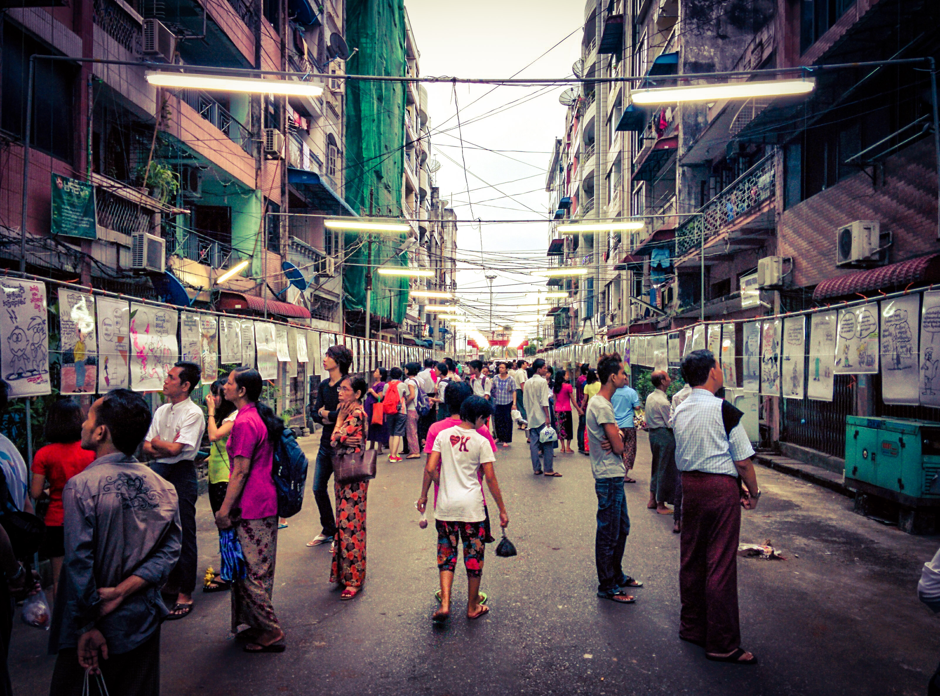 ၂၀၁၄ တွင်ကျင်းပသော ဦးဘဂျမ်းလမ်း ကာတွန်းမီးထွန်းပွဲ (ဓာတ်ပုံပိုင်ရှင် ကိုသန်းထိုက်စိုး ၏ ခွင့်ပြုချက်ဖြင် တင်ပါသည်)